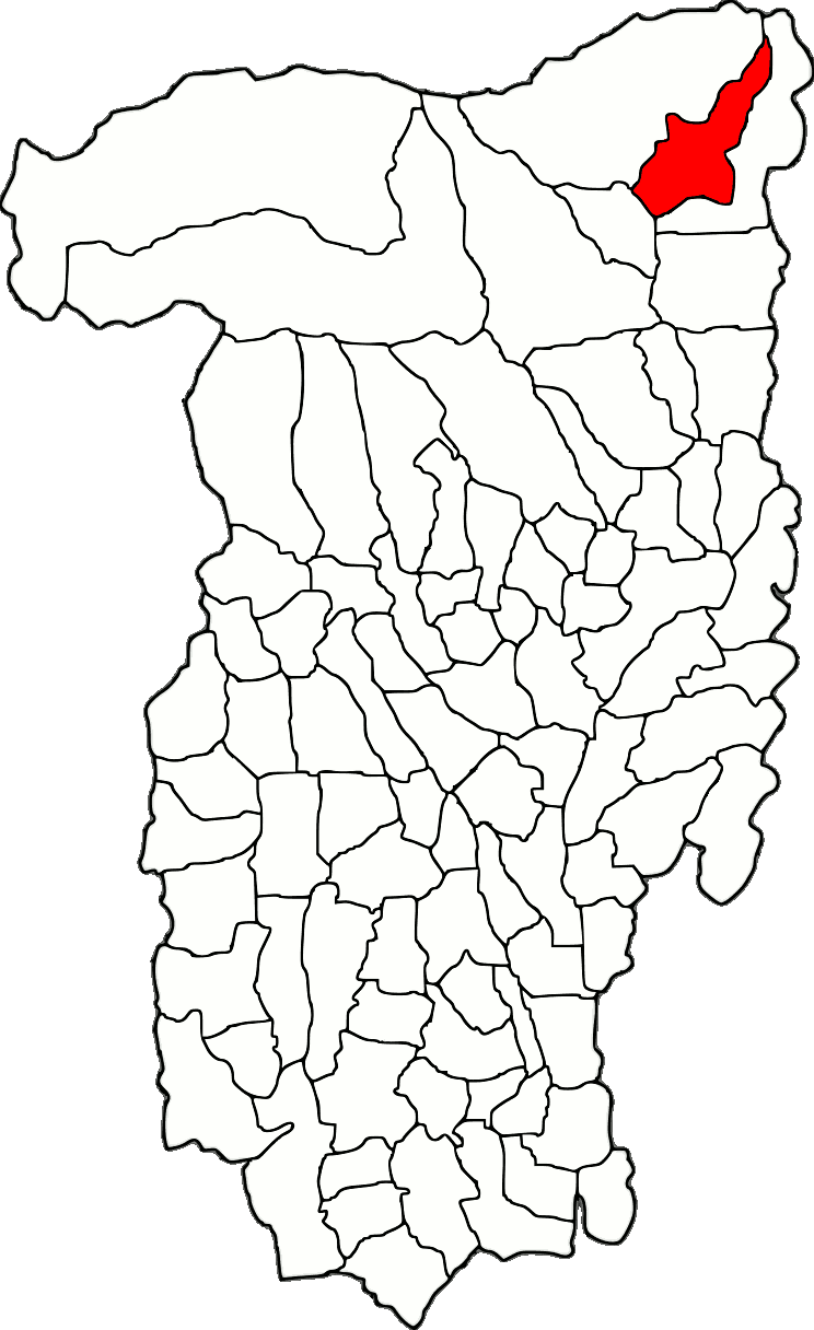 Lage der Gemeinde Boișoara im Kreis Vâlcea (RO).